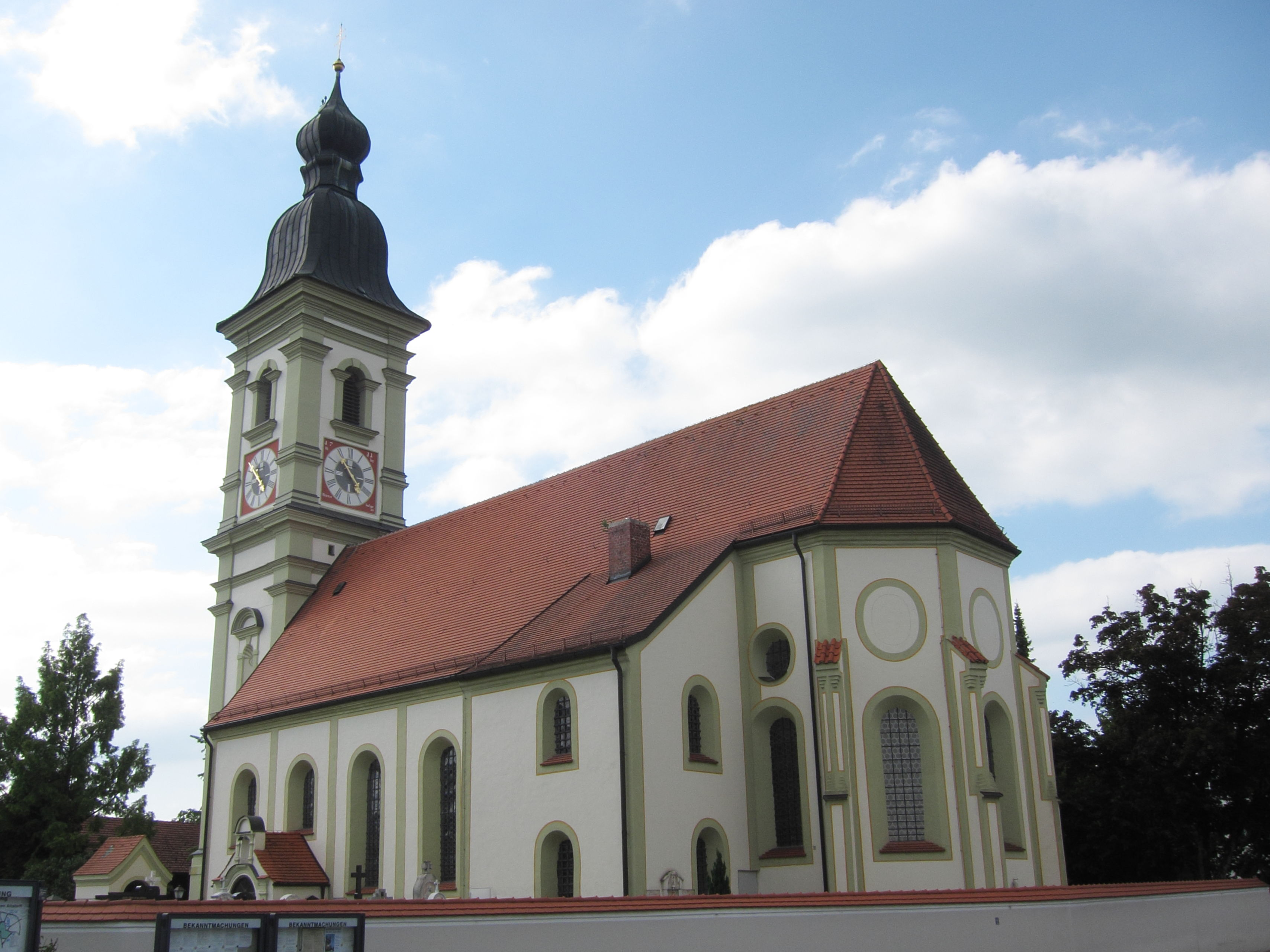 Langengeisling, Alte Römerstraße 167; katholische Pfarrkirche St. Martin, Saalbau mit eingezogenem Chor und Spindelhelmturm, im Kern spätgotisch, Langhaus von Hans Kogler 1667, Turmneubau 1710; mit Ausstattung; Seelenkapelle im Friedhof und Friedhofsmauer, von 1650, erneuert 1791; Lourdesgrotte, Ende 19. Jahrhundert.